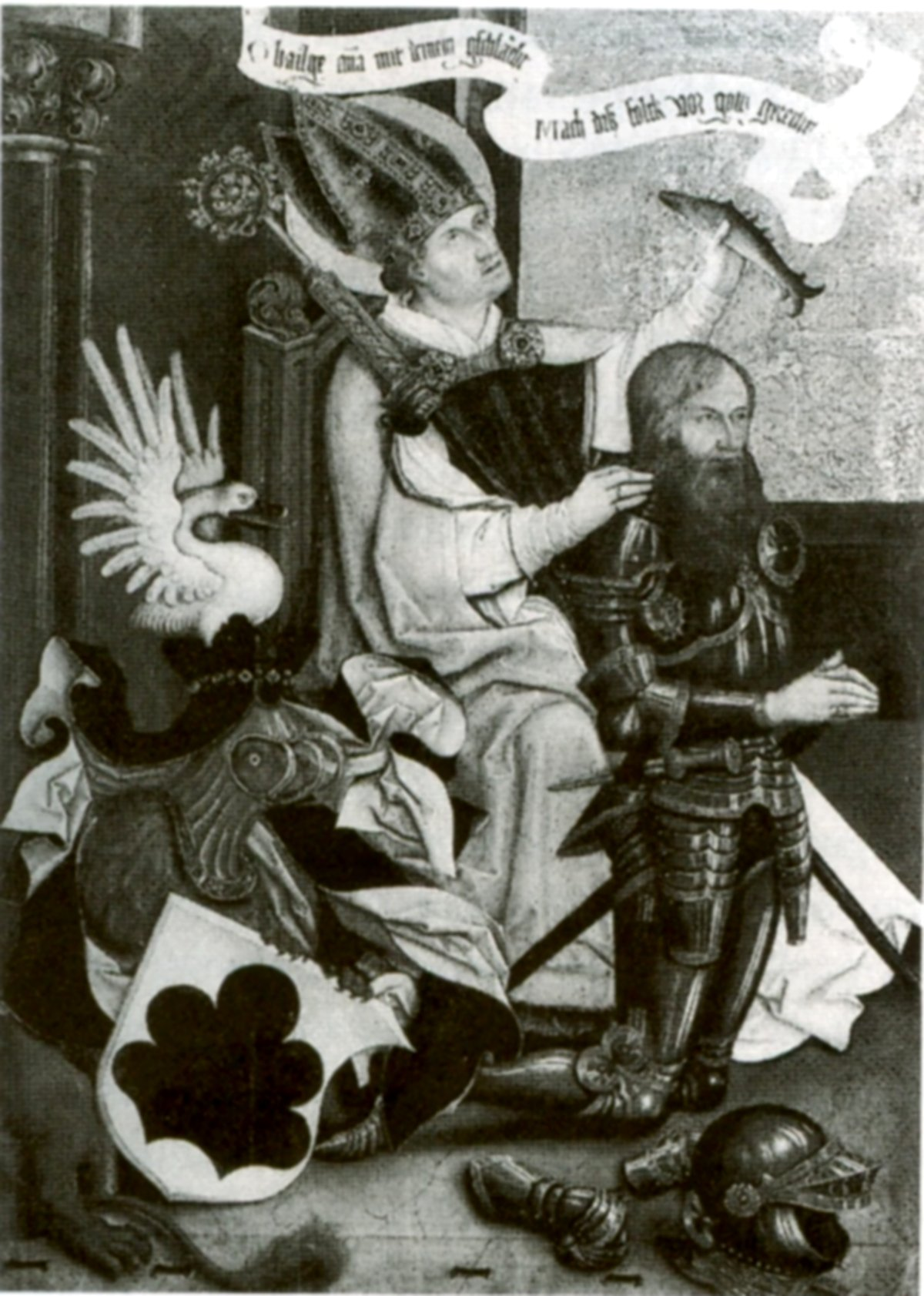 Ulrich von Frundsberg als Stifter der Familienretabel eingescannt aus: Horst Carl: Der Schwäbische Bund 1488 - 1534; Landfrieden und Genossenschaft im Übergang von Spätmittelalter zur Reformation; Leinfelden-Echterdingen, 2000; ISDN 3-87181-424-5, S. 276